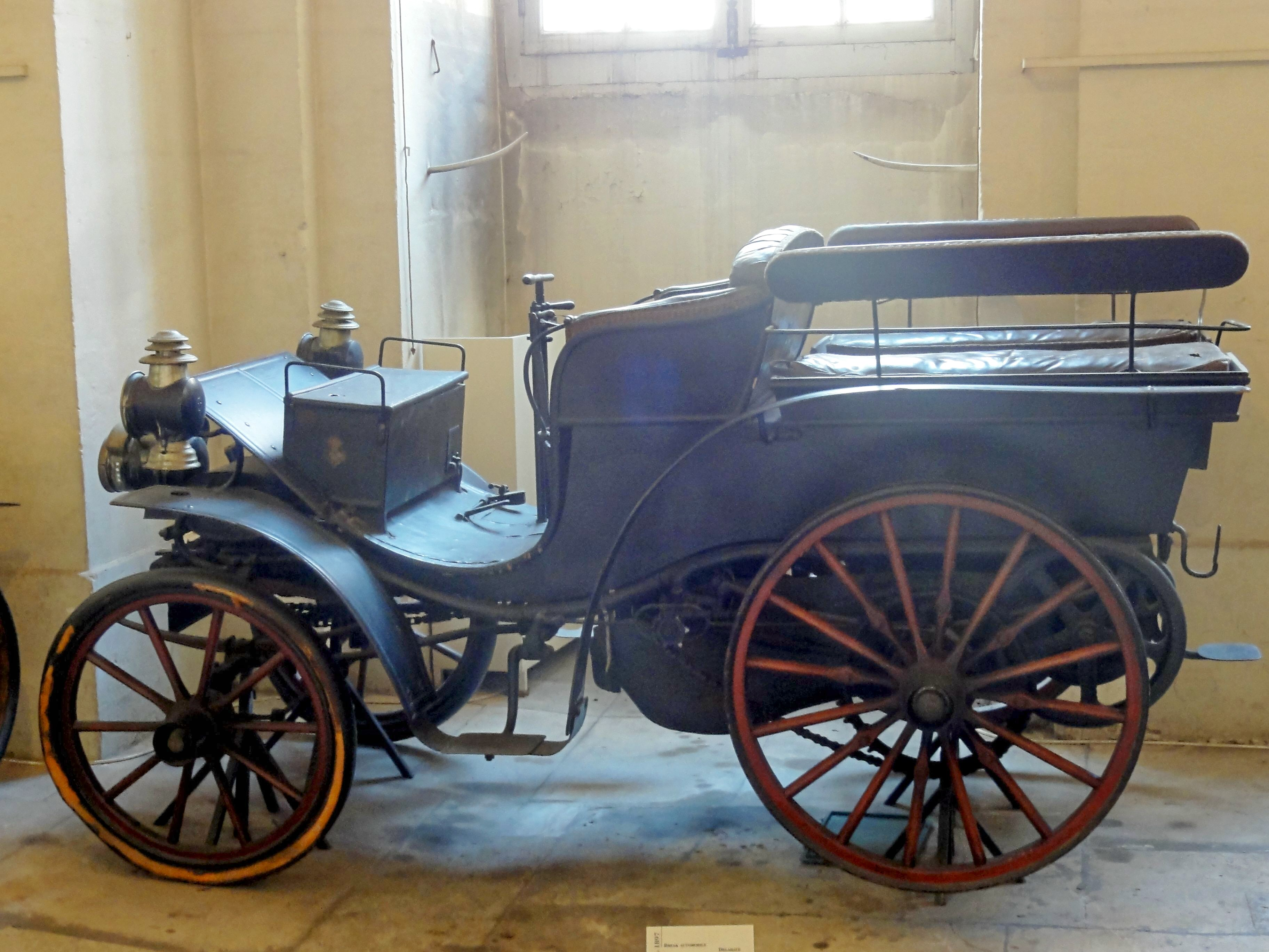 Break automobile Delahaye 1897.